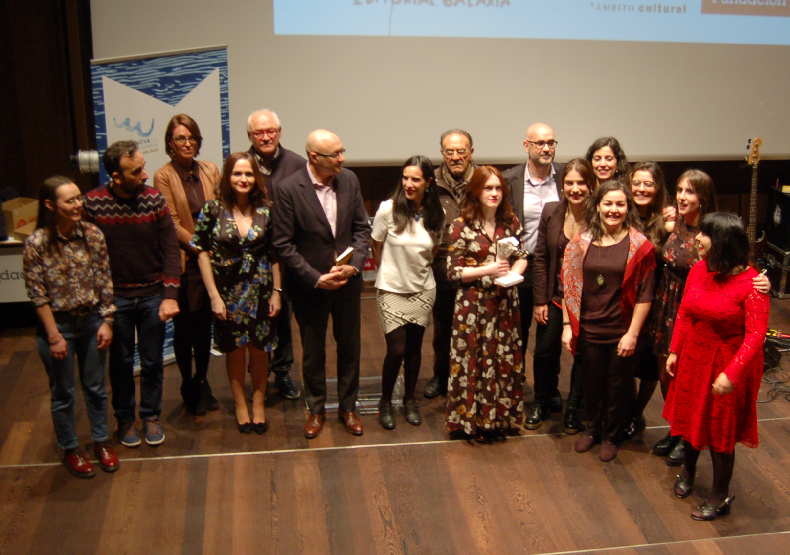 Entrega do Premio Illa Nova 2018